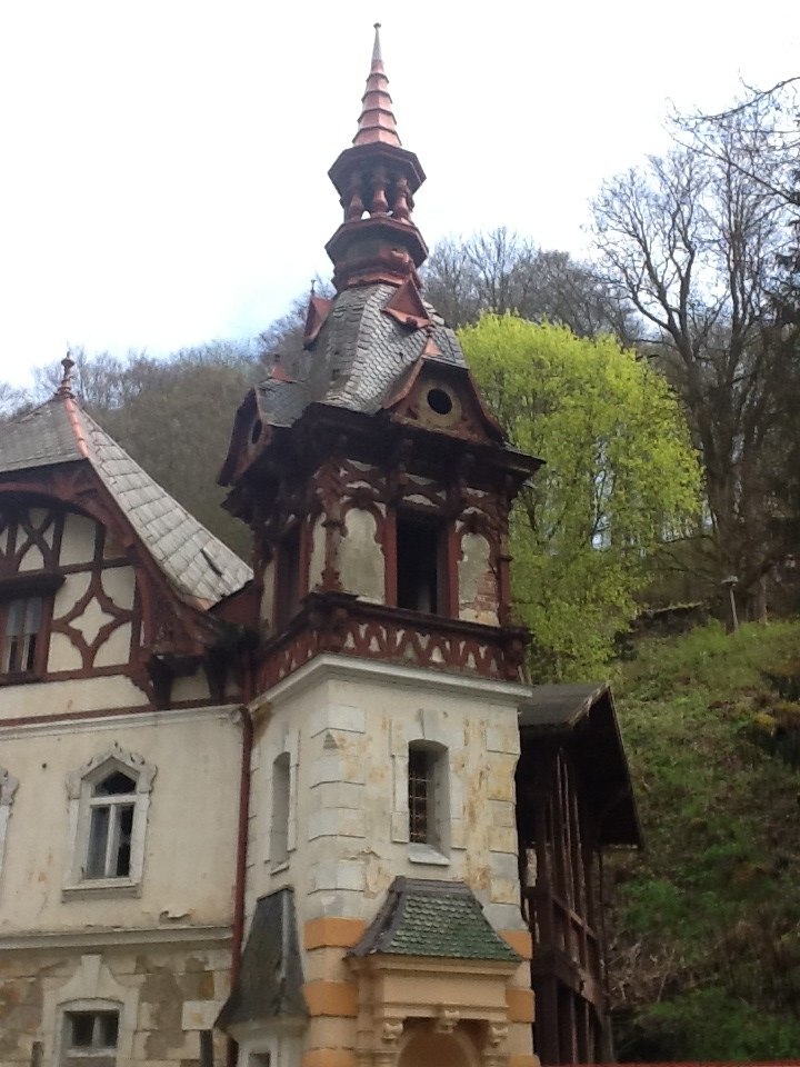 Jindřichův dvůr Lázně Kyselka 2014